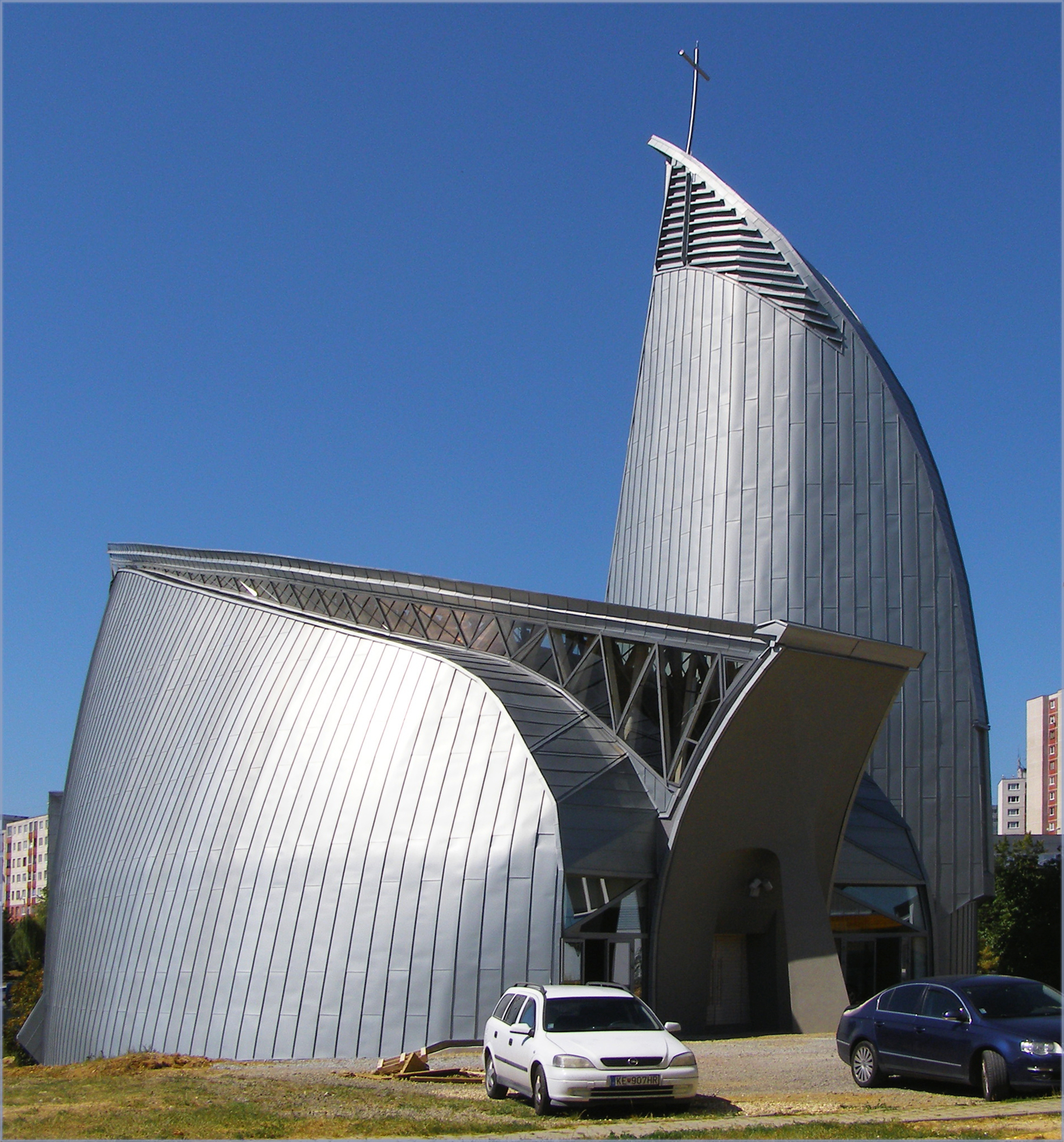 Kostol